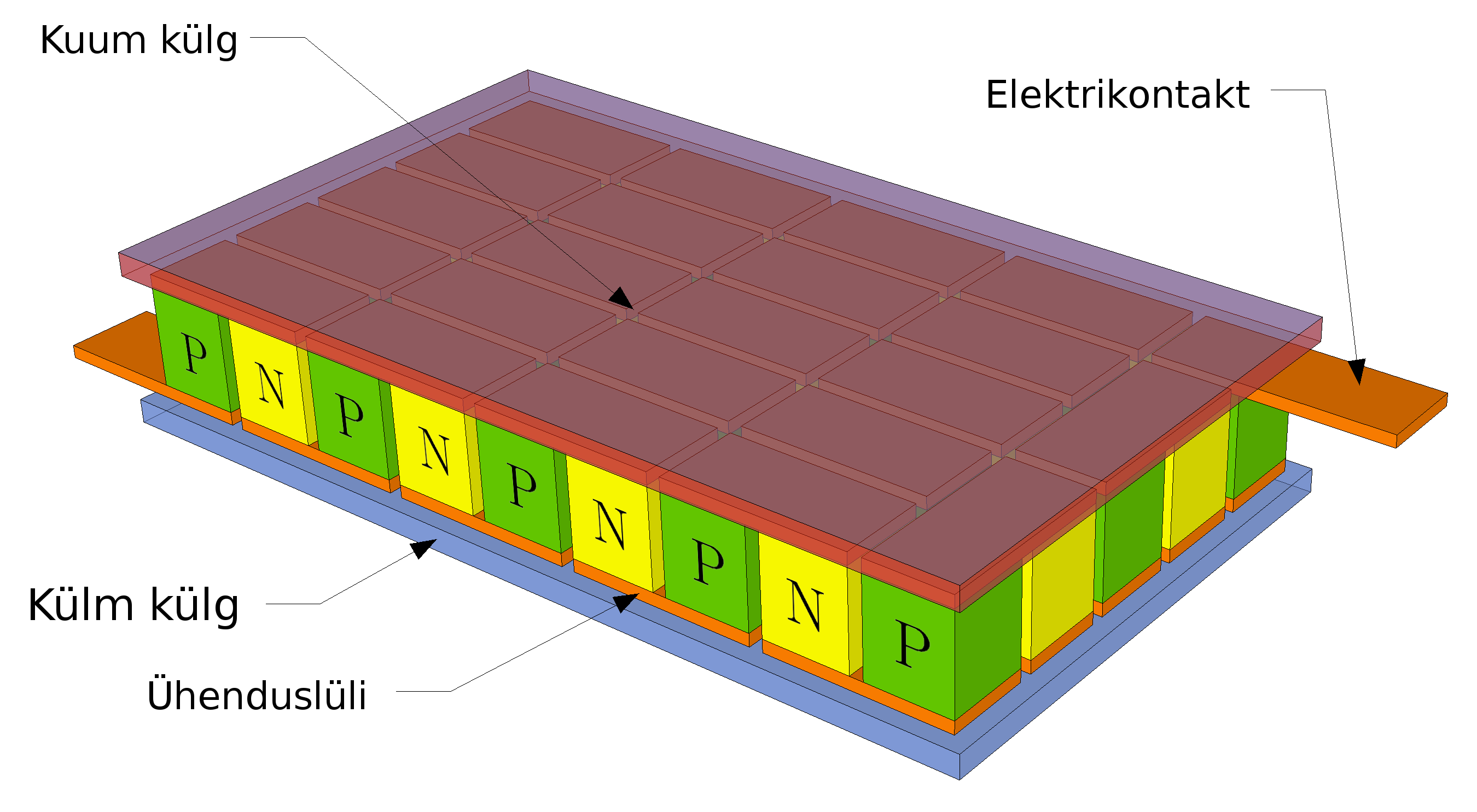 Peltier elemendi skeem. Kõige pealmine ja kõige alumine kiht on elektriliselt isoleeritud soojusjuhid (kujutatud pool-läbipaistvalt), mis on eeldatavasti soojuslikus kontaktis suure soojusmahtuvusega kehadega. Mainitud kihtide vahel on elektriliselt jadamisi ning soojuslikult paralleelselt ühendatud P- ja N-tüüpi pooljuhtide klotsid.